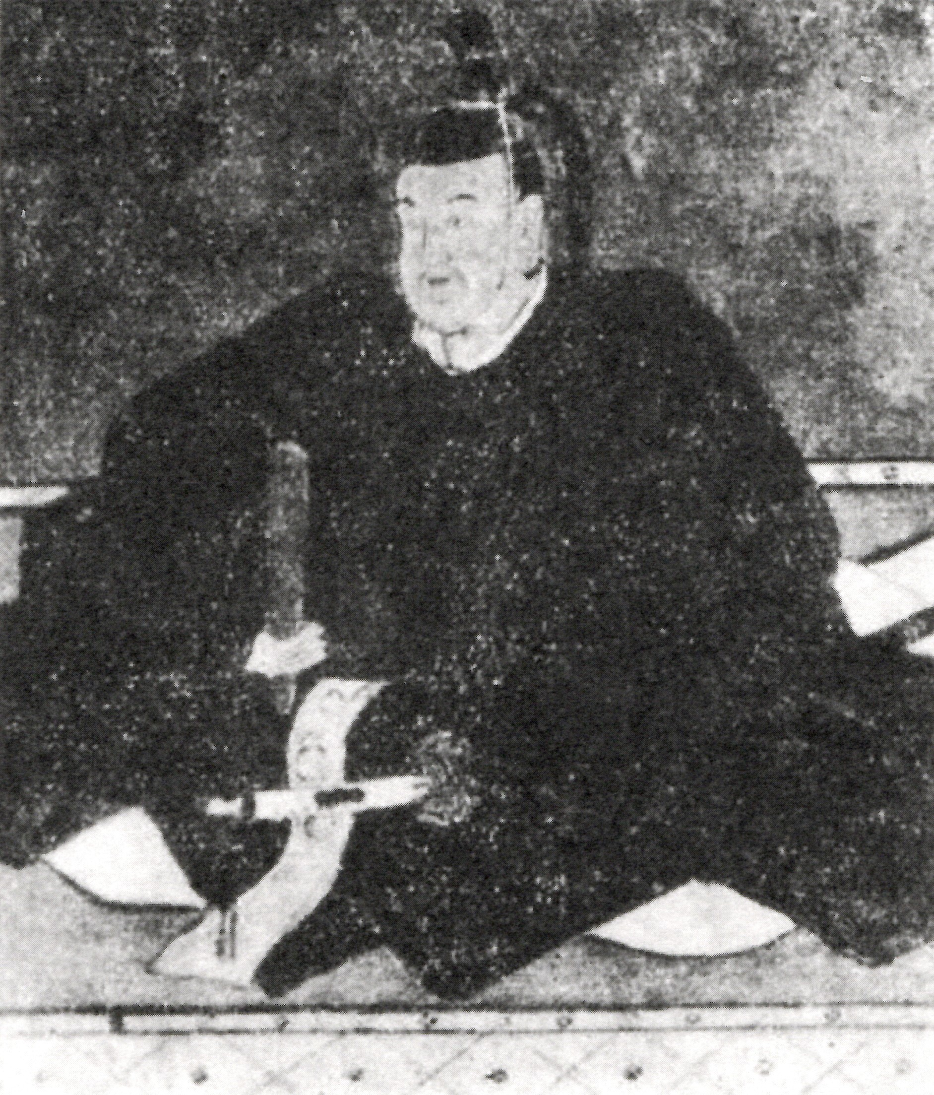 尚庸系永井家3代、岩槻藩主・永井尚平の肖像画。